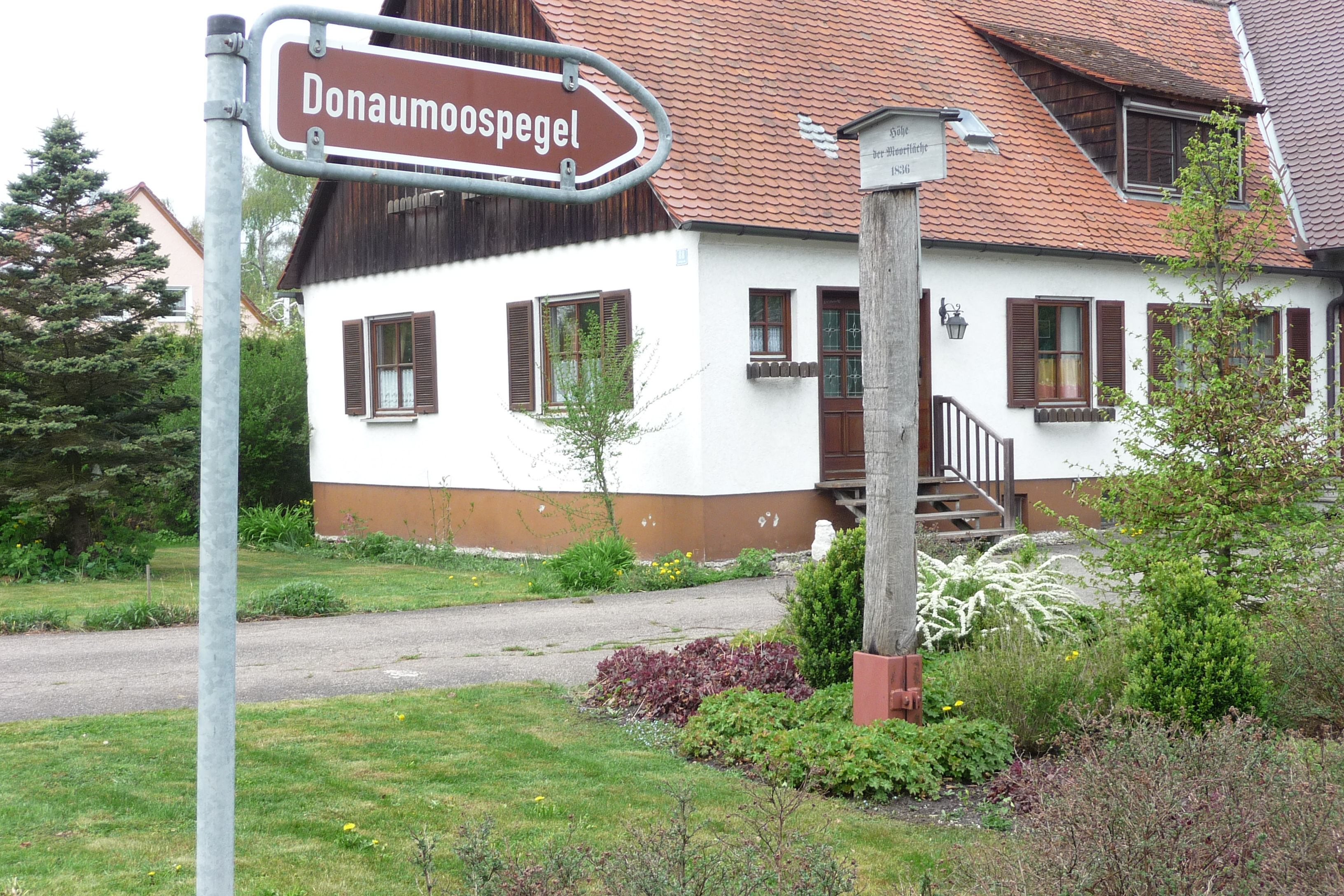 Der Donaumoospegel verdeutlicht die Absackcung des Moorbodens